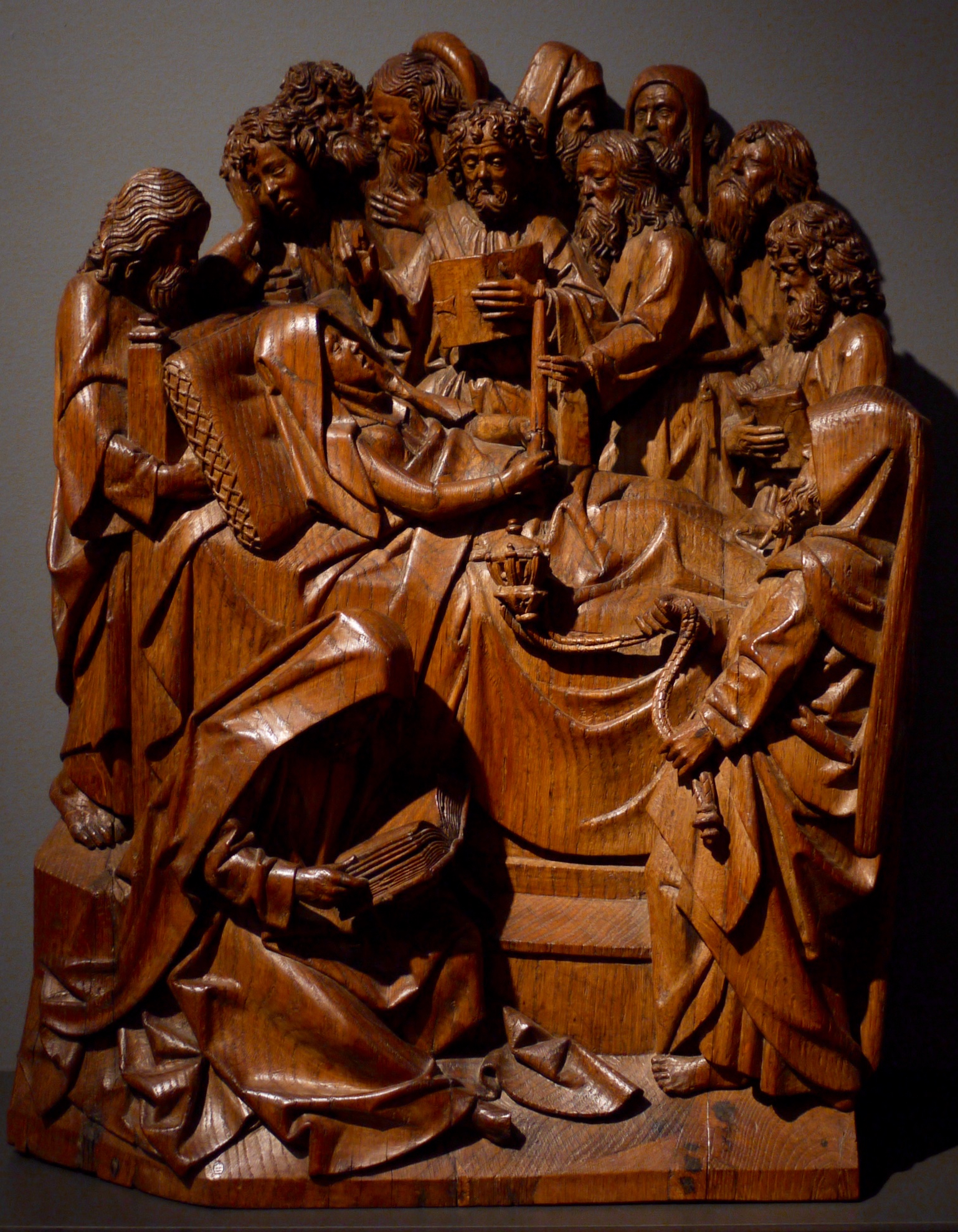 Amsterdam, Rijksmuseum, La Mort de la Vierge Marie, un fragment de l'Autel de Marie, Adriaen van Wesel, 1475-1477